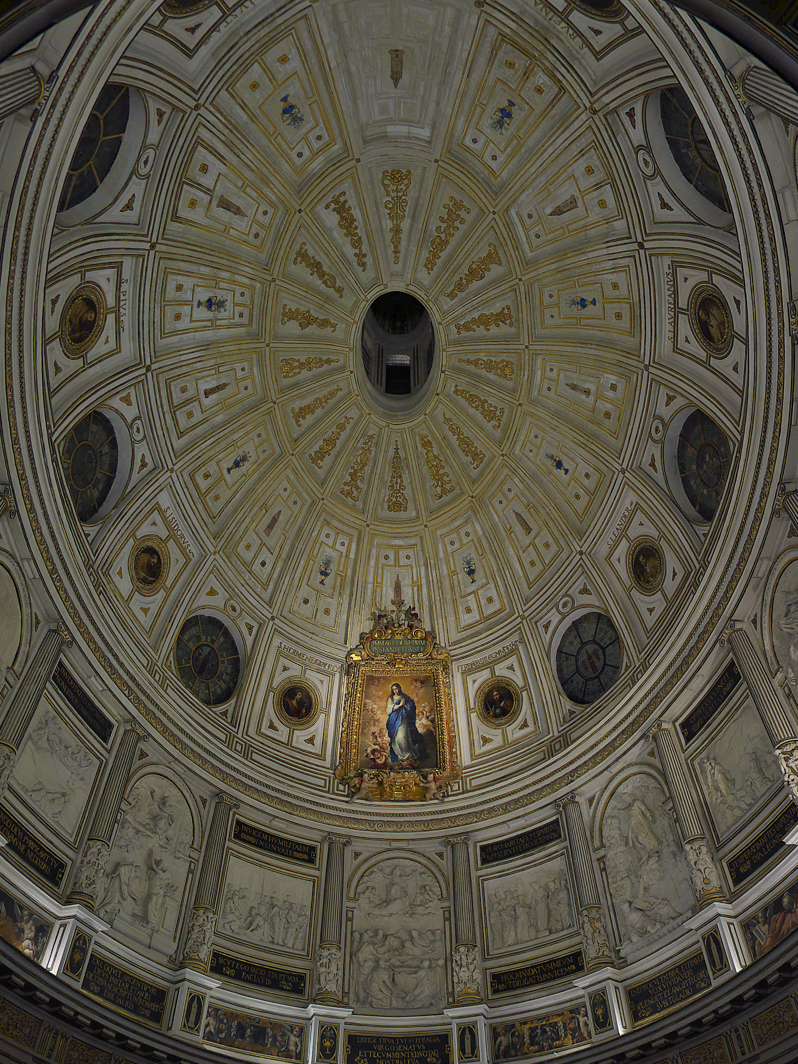 Hernán Ruiz II proyecta la Sala Capilar para el cabildo catedralicio hispalense (1561-1563). Obra capital en la arquitectura renacentista española. Demostración de la alta formación profesional de Hernán Ruiz el Joven, con la primera planta elíptica en España, que cumple fielmente las condiciones funcionales del cabildo, en cuanto a visibilidad y acústica. Asensio de Maeda la cierra en 1592. El canónigo Francisco Pacheco establece el coherente programa teológico e importantes artistas del momento sevillano, completan la admirable obra.